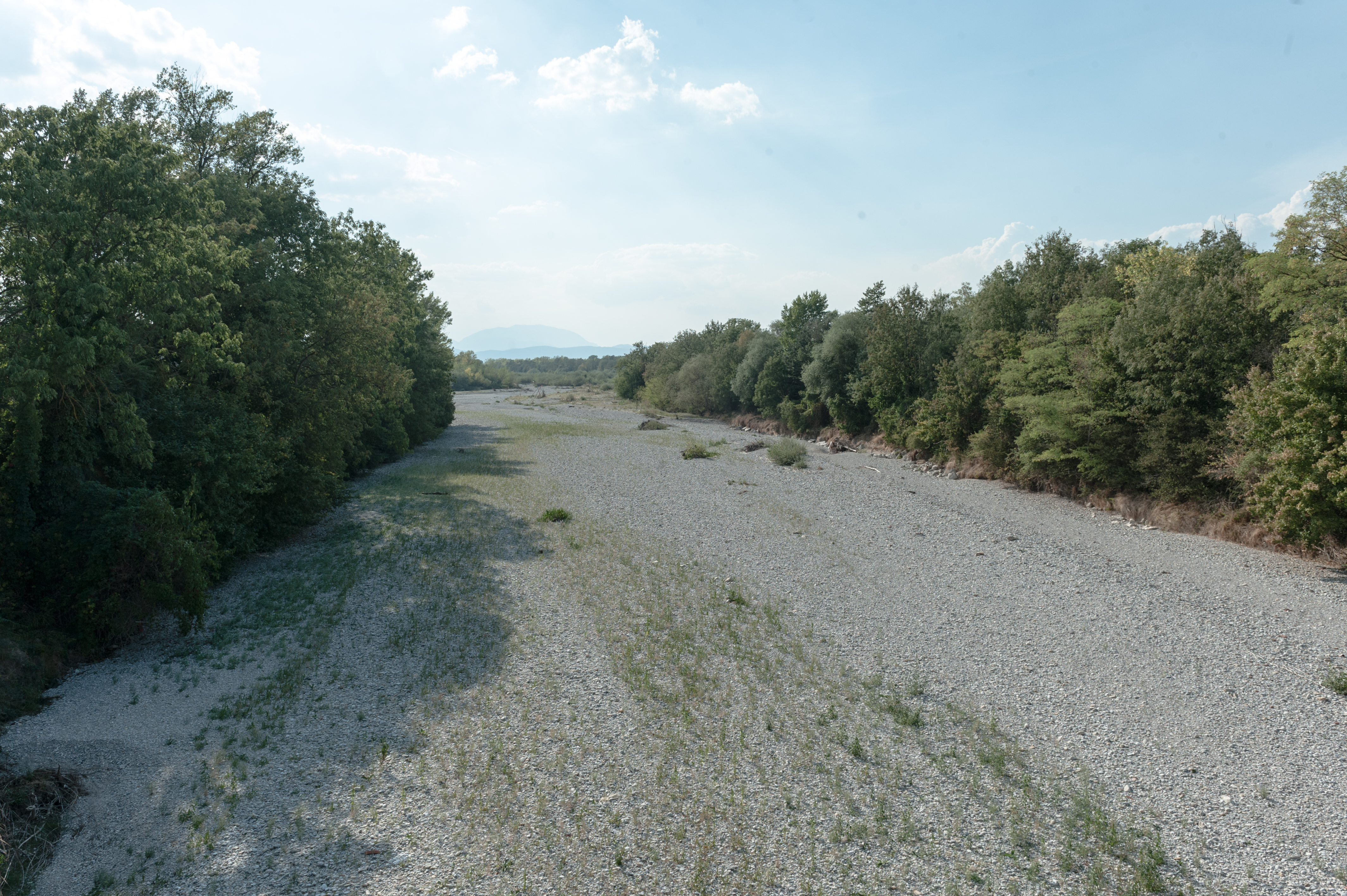 Schwarza bei Bad Erlach im Sommer 2015